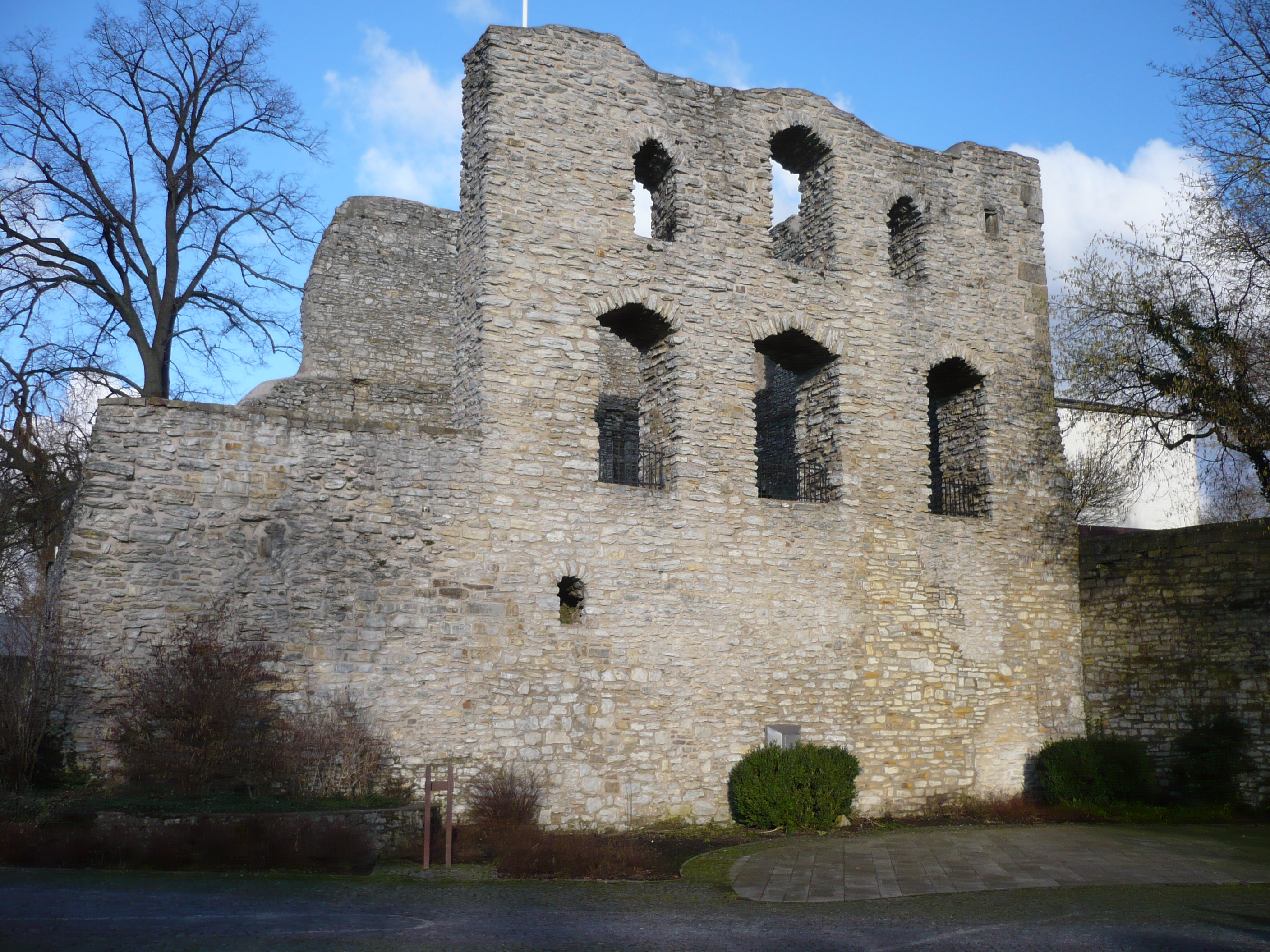 Die Ruine der Burg Lippspringe in Bad Lippspringe